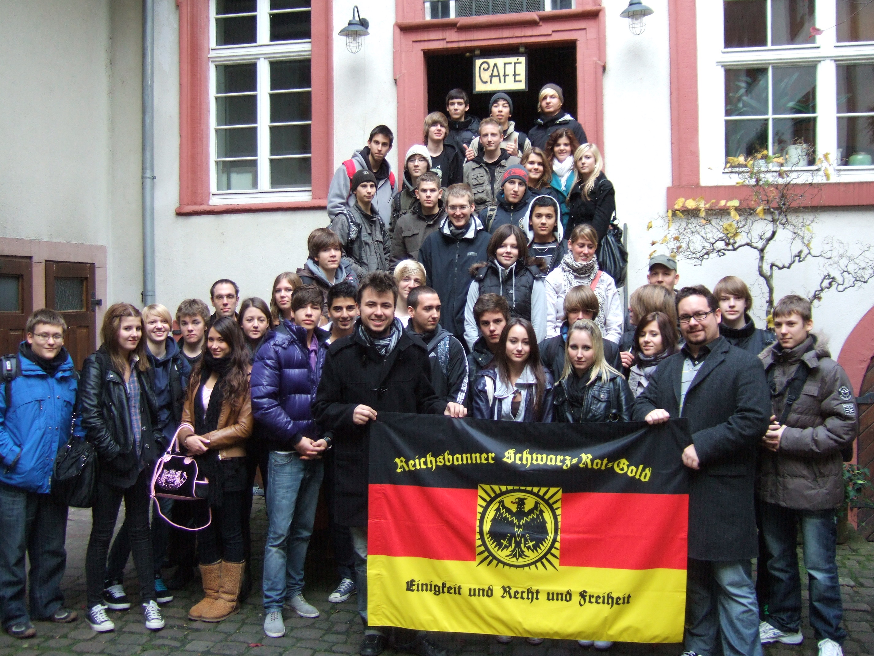 Besuch einer Schülergruppe im Rahmen der Bildungsarbeit des Reichsbanners Schwarz-Rot-Gold in der Friedrich-Ebert-Gedenkstätte in Heidelberg.